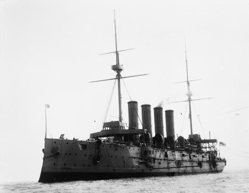 HMS DIADEM.